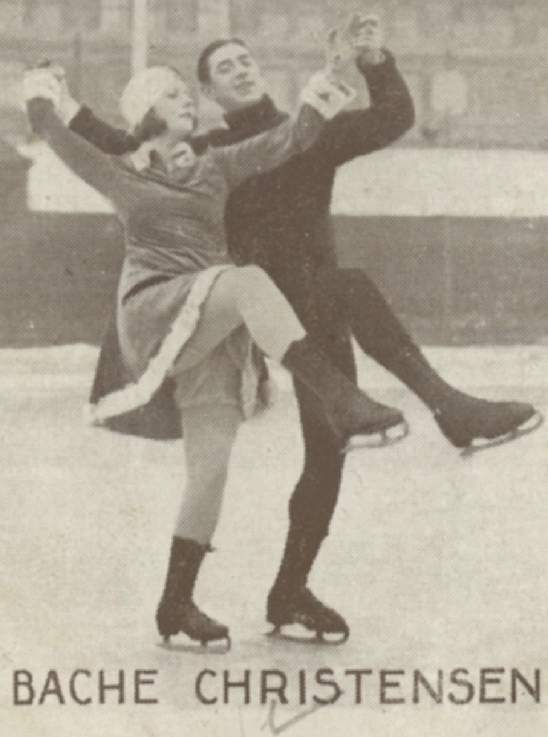 Format: Samlekort Dato / Date: ca. 1930 (dokumentet) Fotograf / Photographer: Ukjent Wikipedia: Randi Bakke (1908 - 1984) Wikipedia: Christen Christensen (1904 - 1969) Eier / Owner Institution: Trondheim byarkiv, The Municipal Archives of Trondheim Arkivreferanse / Archive reference: Sportsklubben Freidig: Sigarettfoto ca. 1930 (Løpenr. 75) F23925 Tekst på baksiden: Frøken Randi Bakke og Christen Christensen er Norgesmestre i parløp såvel for 1930 som for 1929. De har gitt en rekke opvisninger rundt omkring, men har ennu ikke hatt anledning til å prøve sig i internasjonal konkurranse. Merknad: Disse samlekortene med bilder av norske og internasjonale idretthelter fulgte med i sigarettpakker på 1920 og 30-tallet - derav tobakksreklamen på baksiden. Samlekortene kommer fra Sportsklubben Freidigs arkiv, og inneholder nærmere 90 unike kort pent plassert i et samlealbum. Samleren var den senere skipsmegler Finn Følling (1914 – 1985).